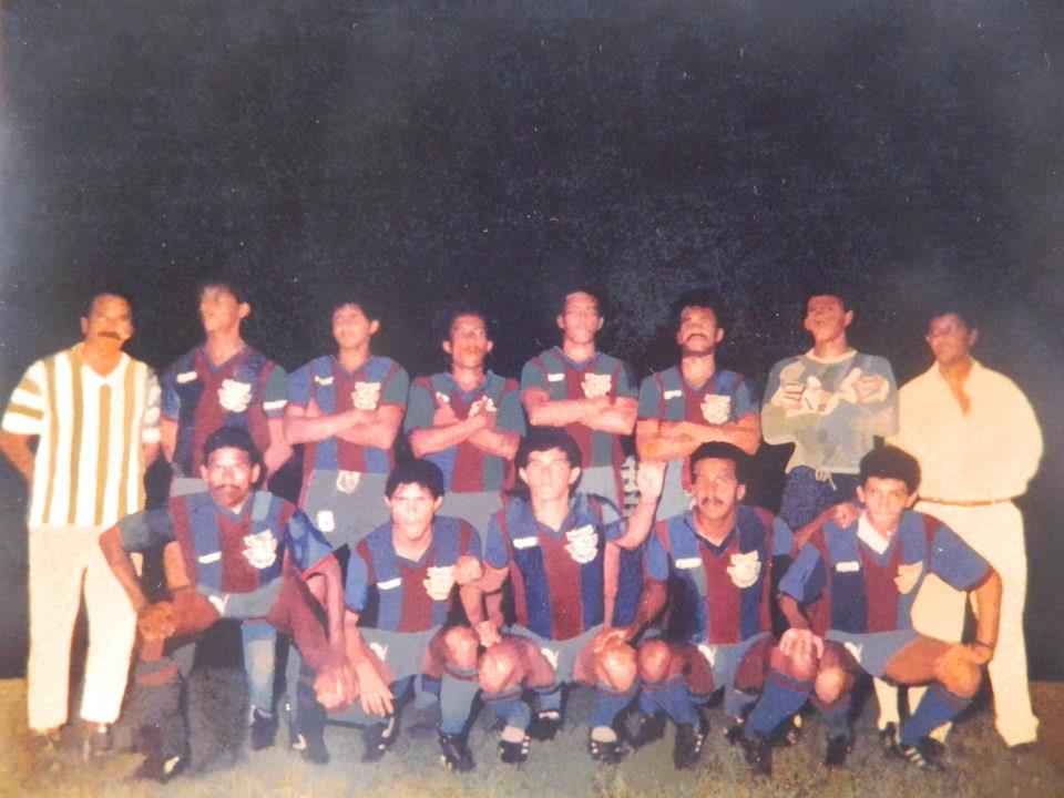 Plantilla del Monagas SC - 1990